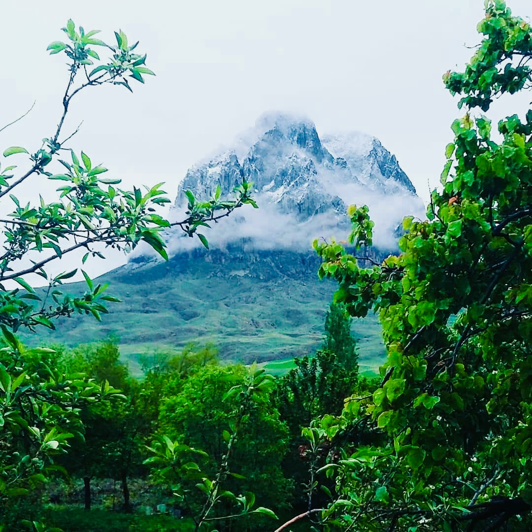 Saltaq